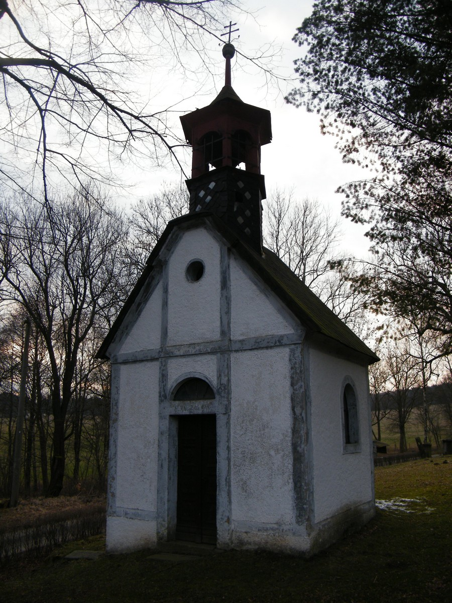 Kaple Panny Marie v Liščím, obec Lipová